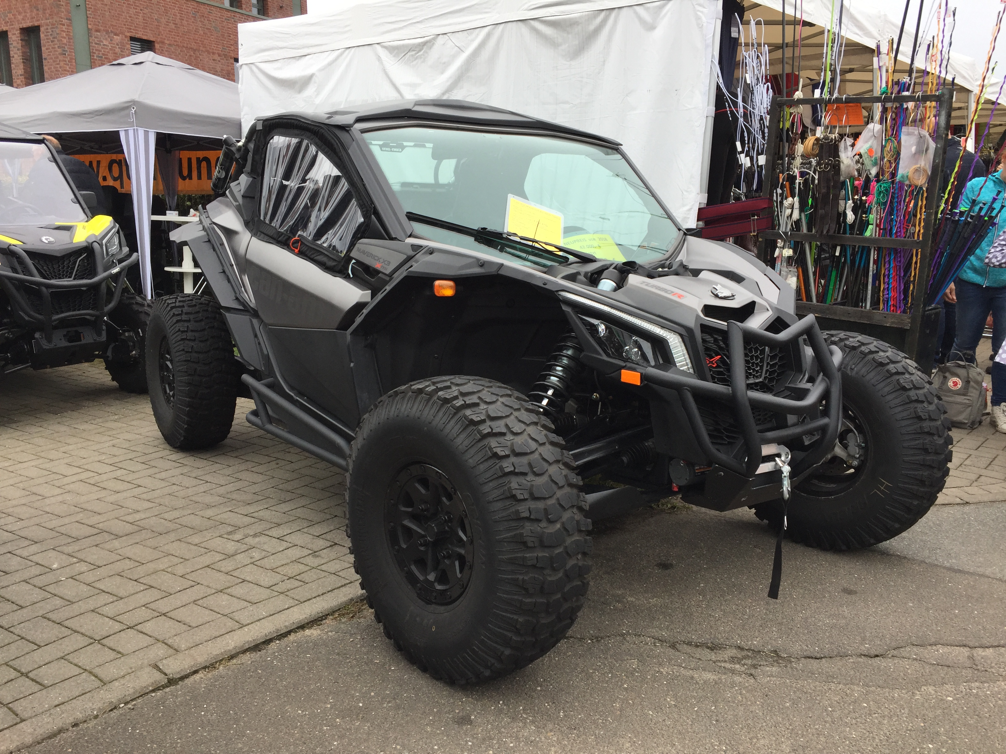 Can-Am "Maverick" Quad Frontansicht